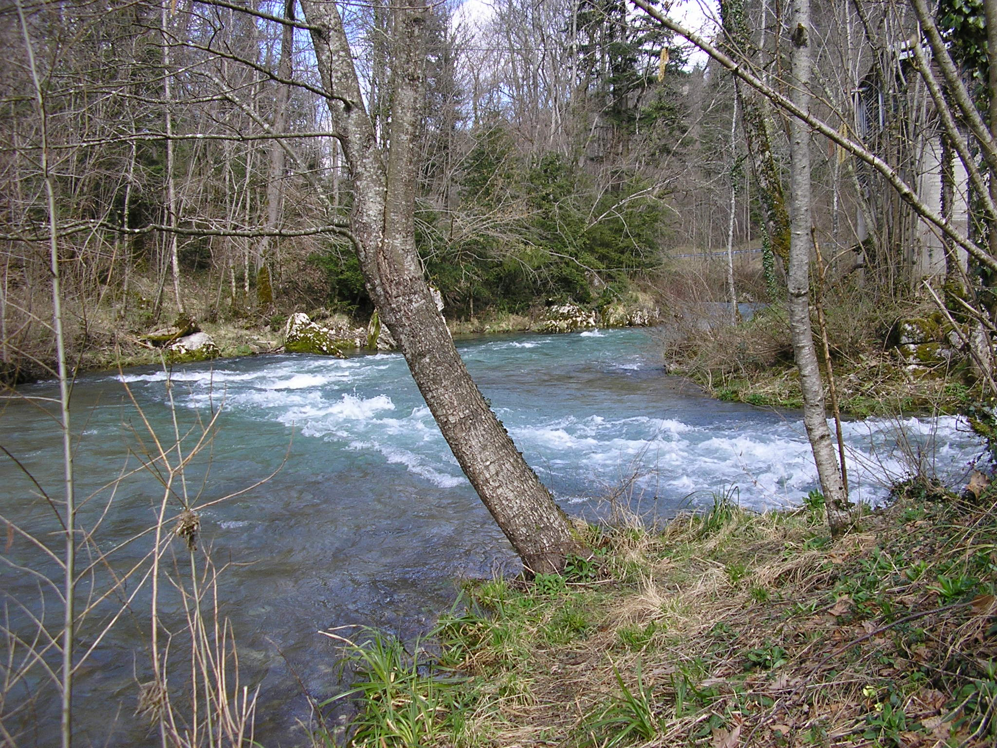 Confluent Hers Fontestorbes à Bélesta (09) pris en photo par moi-même Utilisateur:Audouy